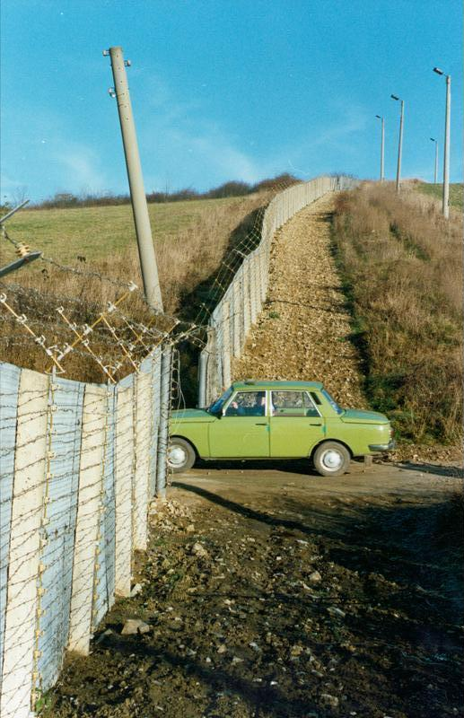 Provisorischer Grenzübergang bei Katharinenberg ADN-ZB/Ludwig/21.11.89/Bez. Erfurt: Neue Grenzübergänge in die BRD wurden auch im Bezirk Erfurt geschaffen: in Ellrich, Kreis Nordhausen; Untersuhl im Kreis Eisenach; Hohengandern im Kreis Heiligenstadt und Katharinenberg im Kreis Mühlhausen. Noch während die Ausbauarbeiten an der Kontrollstelle Katharienenberg im Gange waren, nutzten die ersten Reisenden ein Provisorium als Grenzübergang. [PKW "Wartburg" passiert Grenze]